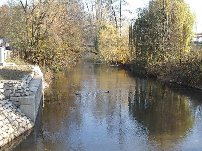 Die Bibert von W, ein naturnah kanalisierter Bach in Zirndorf.